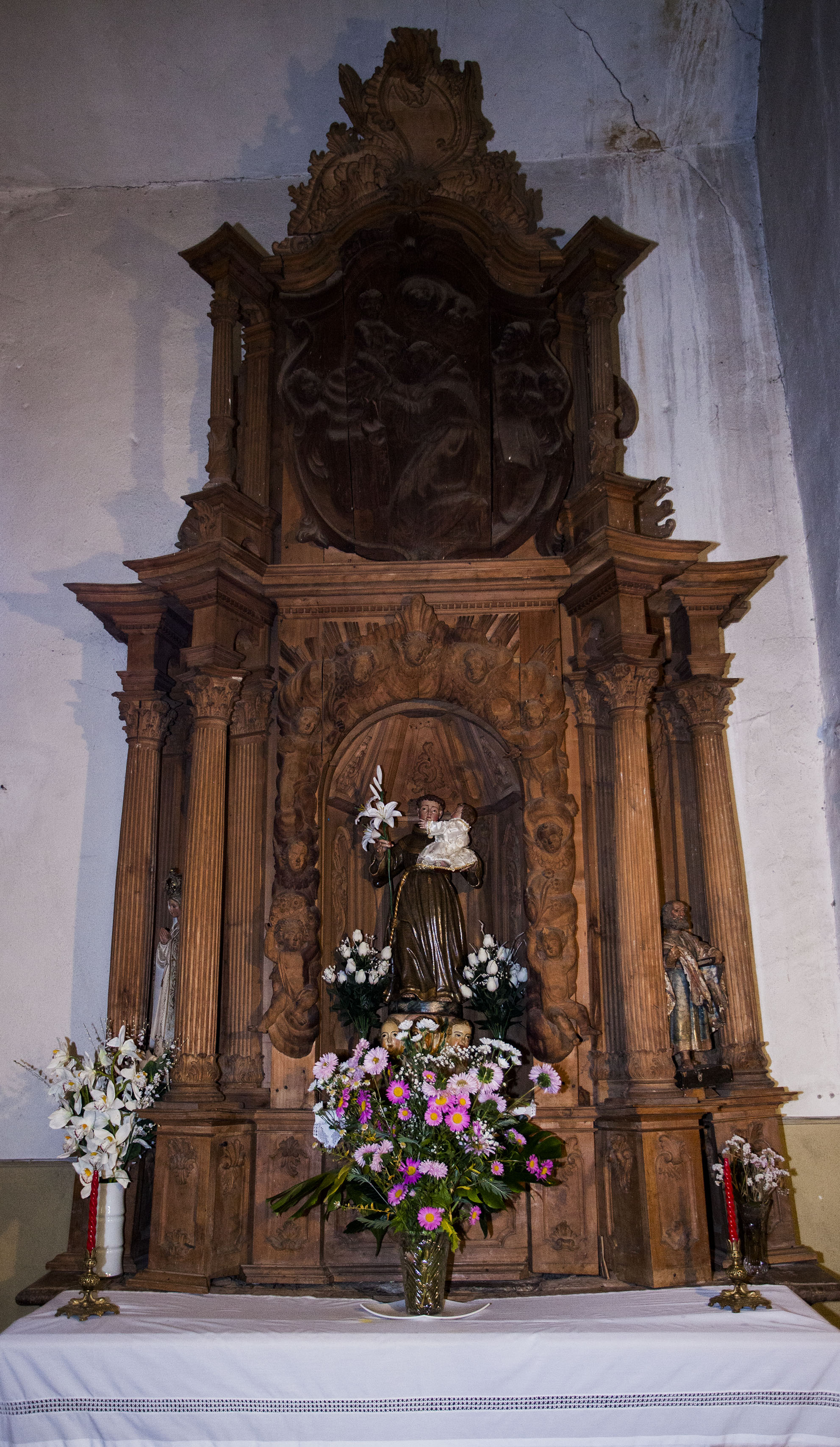 Retablo de San Antonio de Padua de la iglesia parroquial de Albares de la Ribera